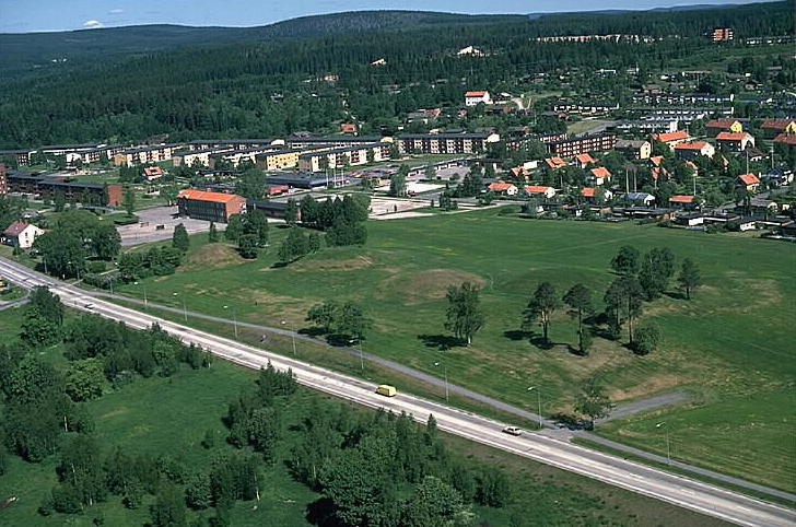 Selånger 1:1, Höggravfältet i bildens mitt. Motiv: Selånger 1:1 Nyckelord: Flygbilder, Riksintressen Kategori: Hög Selånger 1:1, Höggravfältet i bildens mitt. Selånger 1:1.